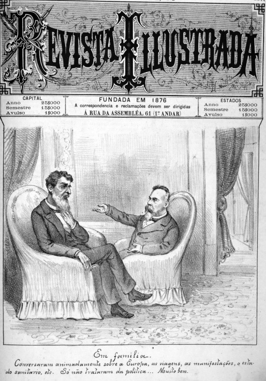 Caricatura de Prudente de Morais e Campos Sales numa caricatura na "Revista Illustrada".